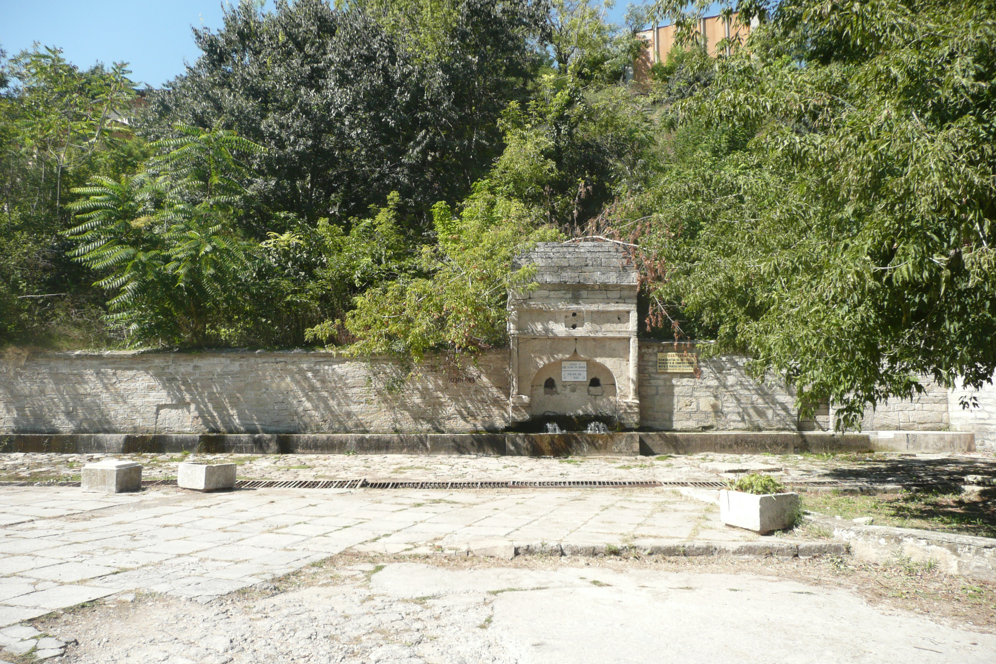 Чешма от османската епоха до старата турска баня в Каварна